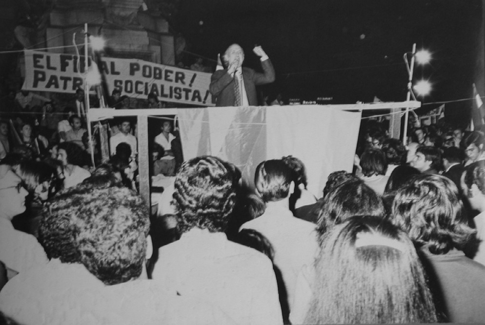 Description=Spilimbergo en Plaza Italia 1973 Source=trabajo propio Date=1999 Author=Julio Fernández Baraibar